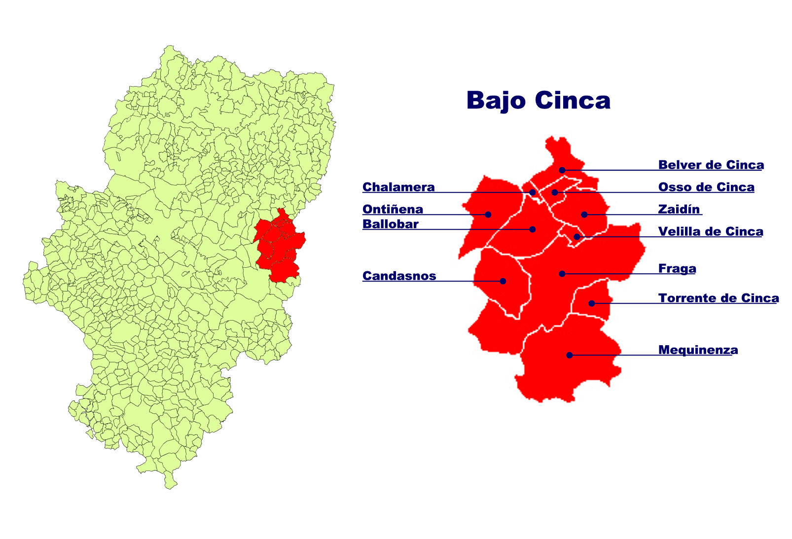 Comarca del Bajo Cinca